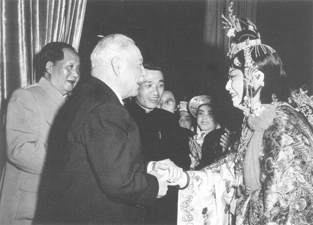 1957年，苏联最高苏维埃主席团主席伏罗希洛夫来中国访问。在北京看了著名京剧艺术家梅兰芳的演出后，上台祝贺演出成功。